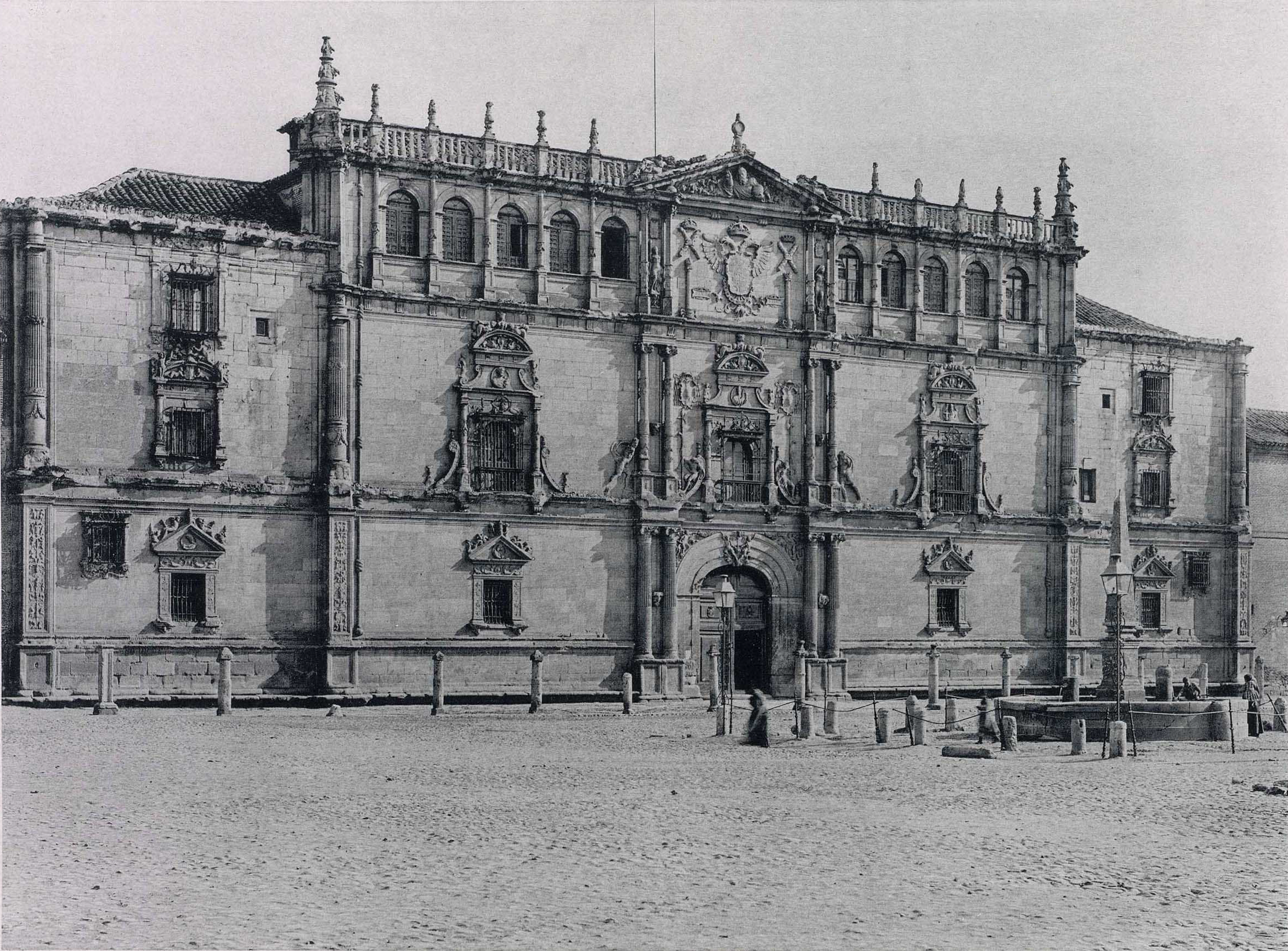 Fachada del Colegio Mayor de San Ildefonso de la Universidad de Alcalá (Comunidad de Madrid - España). Obra de Rodrigo Gil de Hontañón, construida entre 1537 y 1553. Fotografía tomada en 1891 por Hauser y Menet.